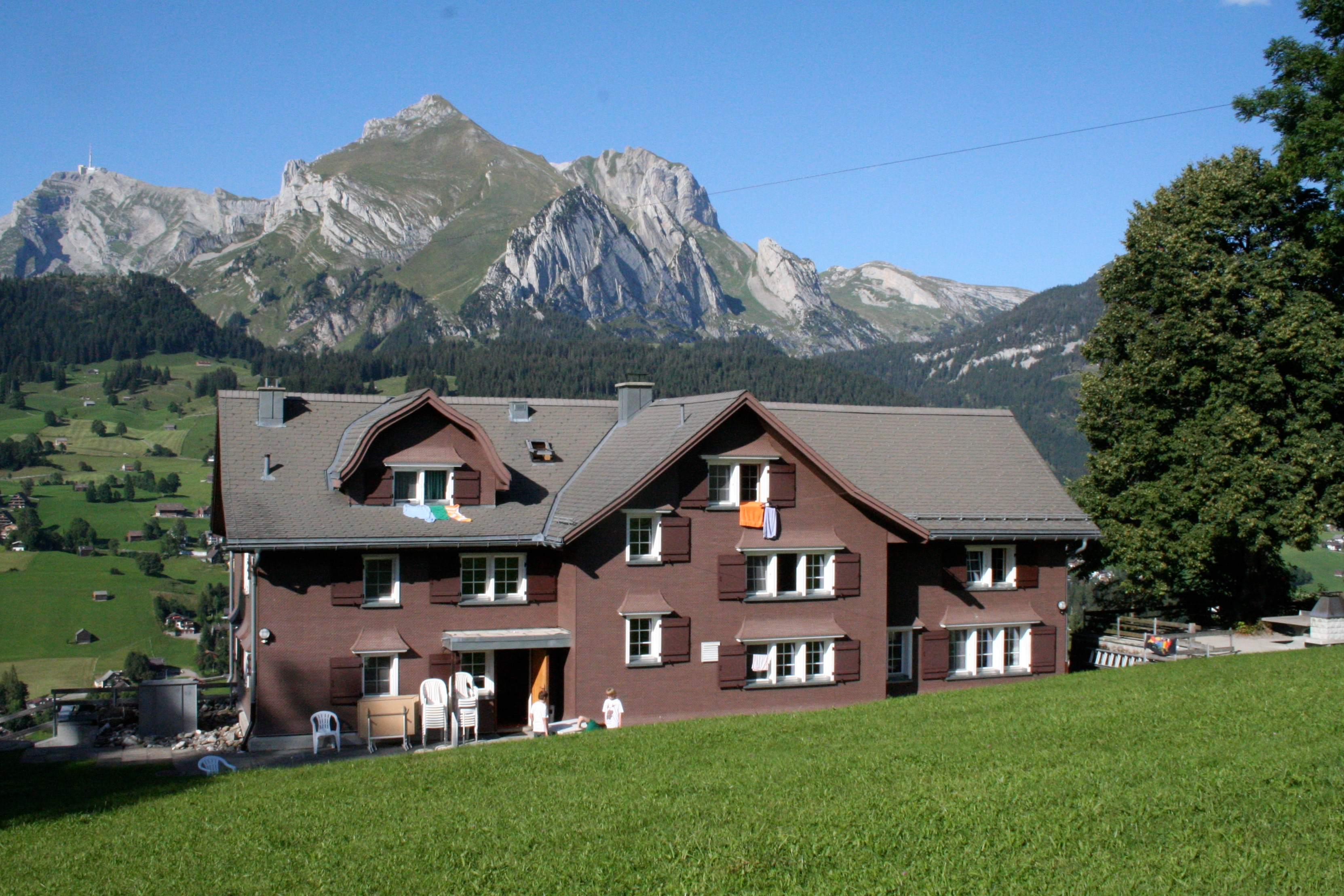 Zolliker Ferienhaus Höchi in Wildhaus SG